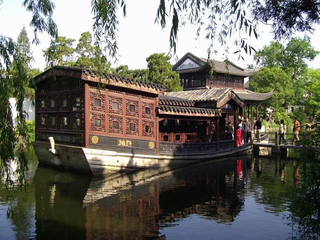 総統府 煦園 2004年5月4日撮影 撮影者:権作 参照：